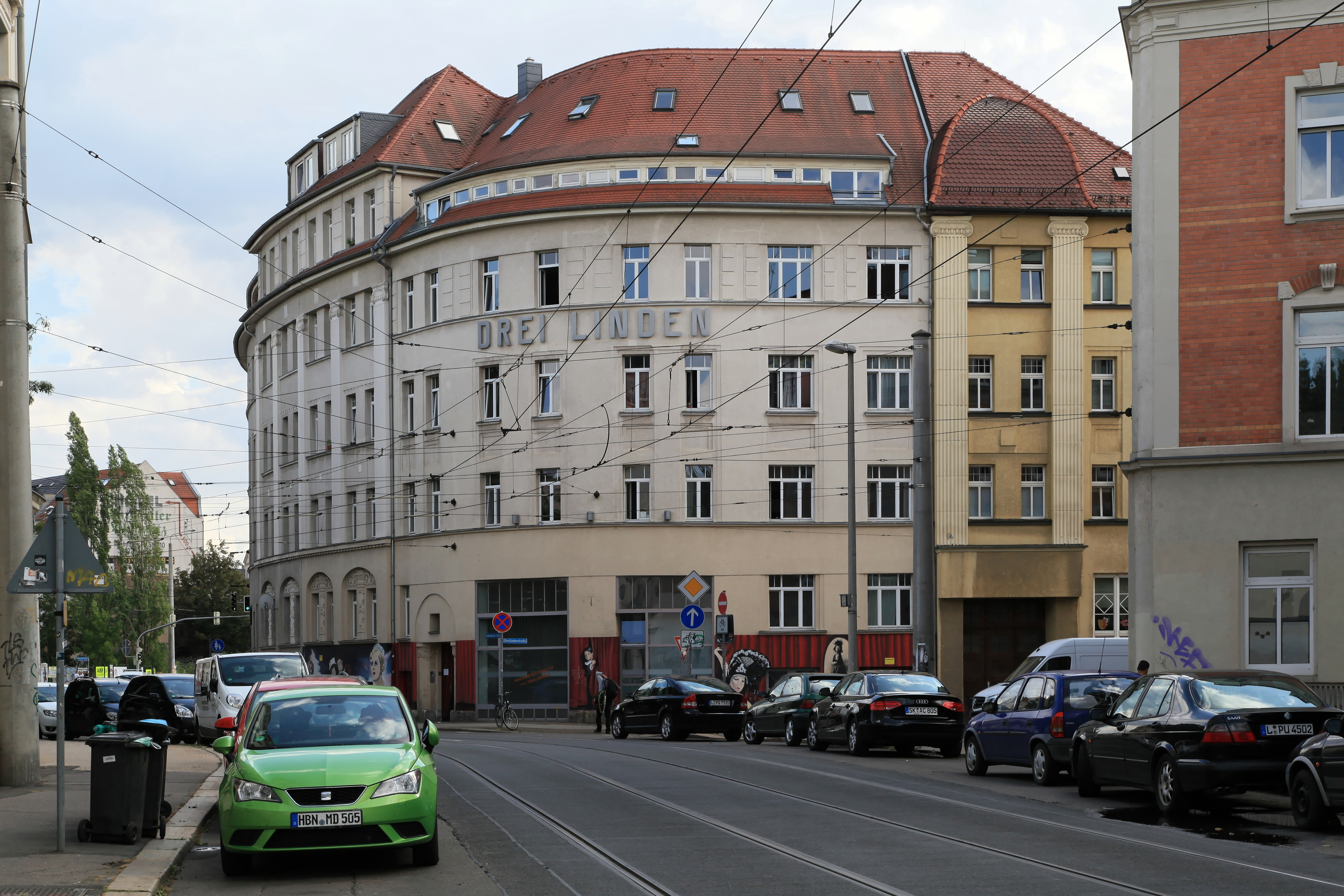 Zschochersche Straße mit Haus Nr. 2 und ehemaligem Gasthaus Dreilinden in der Dreilindenstraße in Leipzig